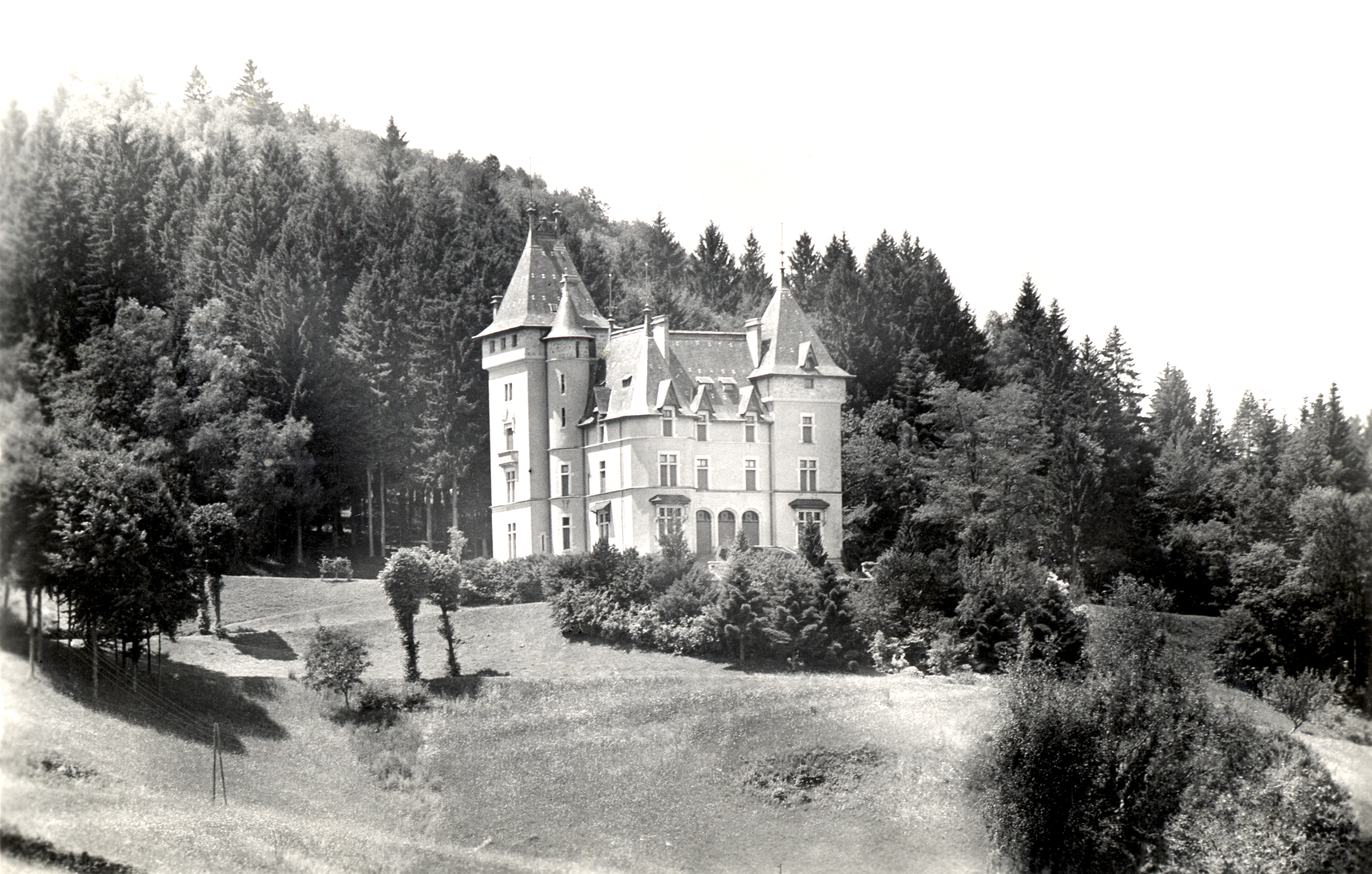 Le Château Descours en 1910, à Saint-Sixte. Commune de Merlas (Isère, France) Photo datant de 1910.